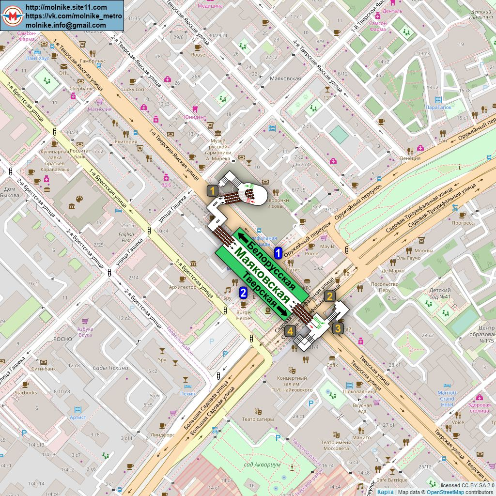 Схема станции метро «Маяковская» на карте Москвы